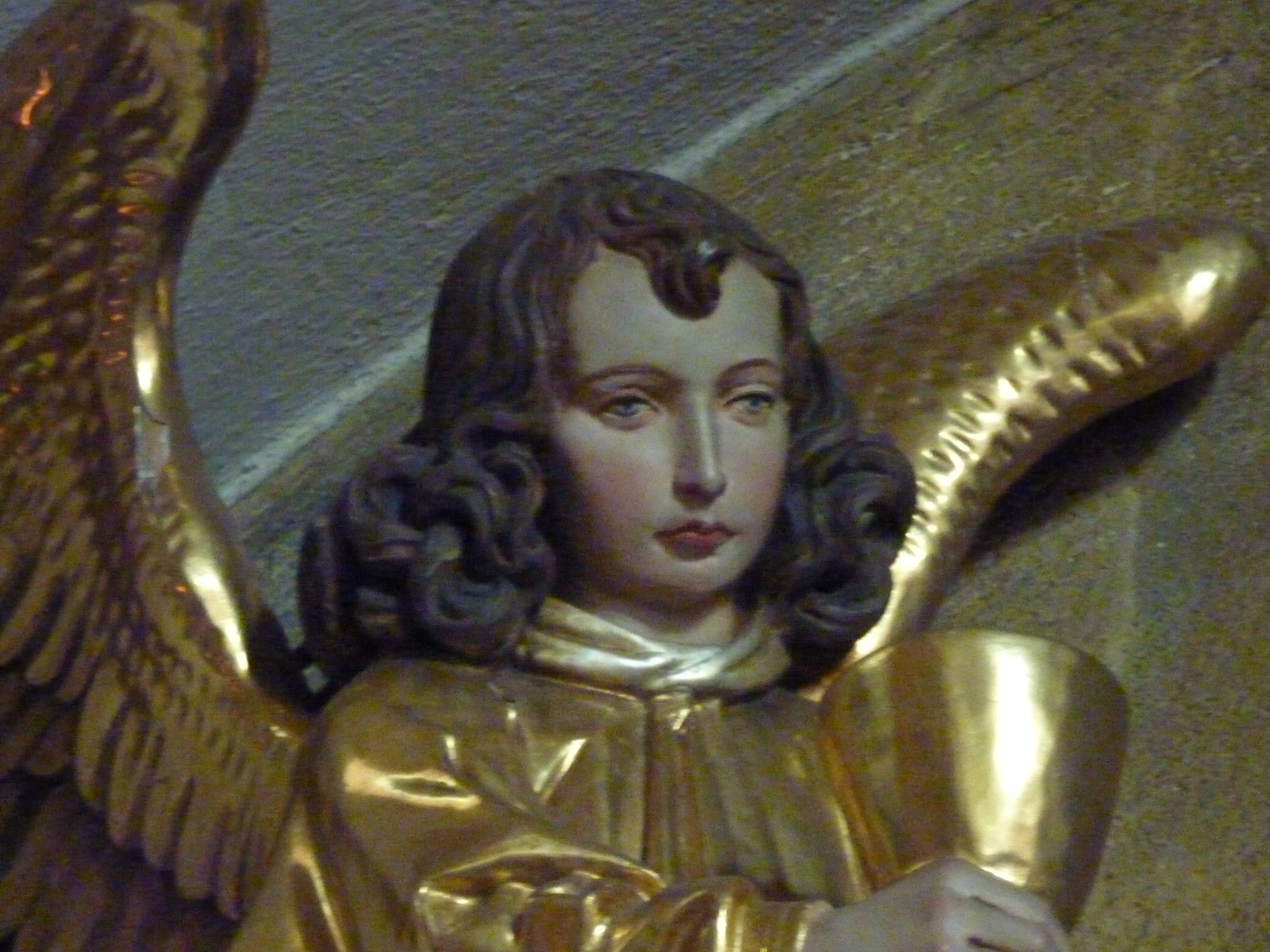 Detail der Ölberggruppe in St. Martin in Blaichach, um 1500